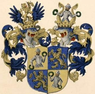 Traubenbergi suguvõsa aadli- ning Rausch von Traubenbergi suguvõsa parunivapp